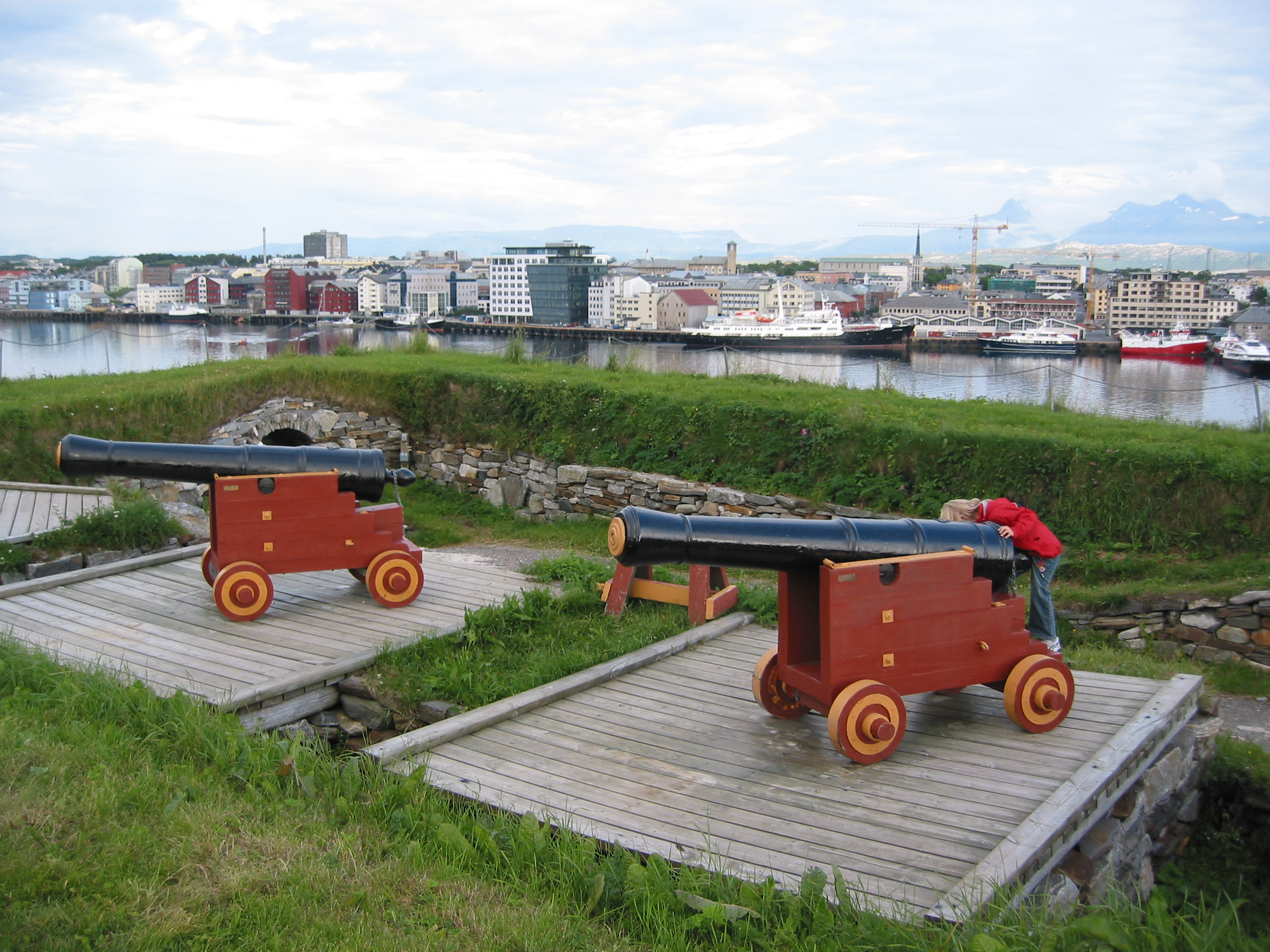 Bodø sentrum sett fra Nyholms Skandse.